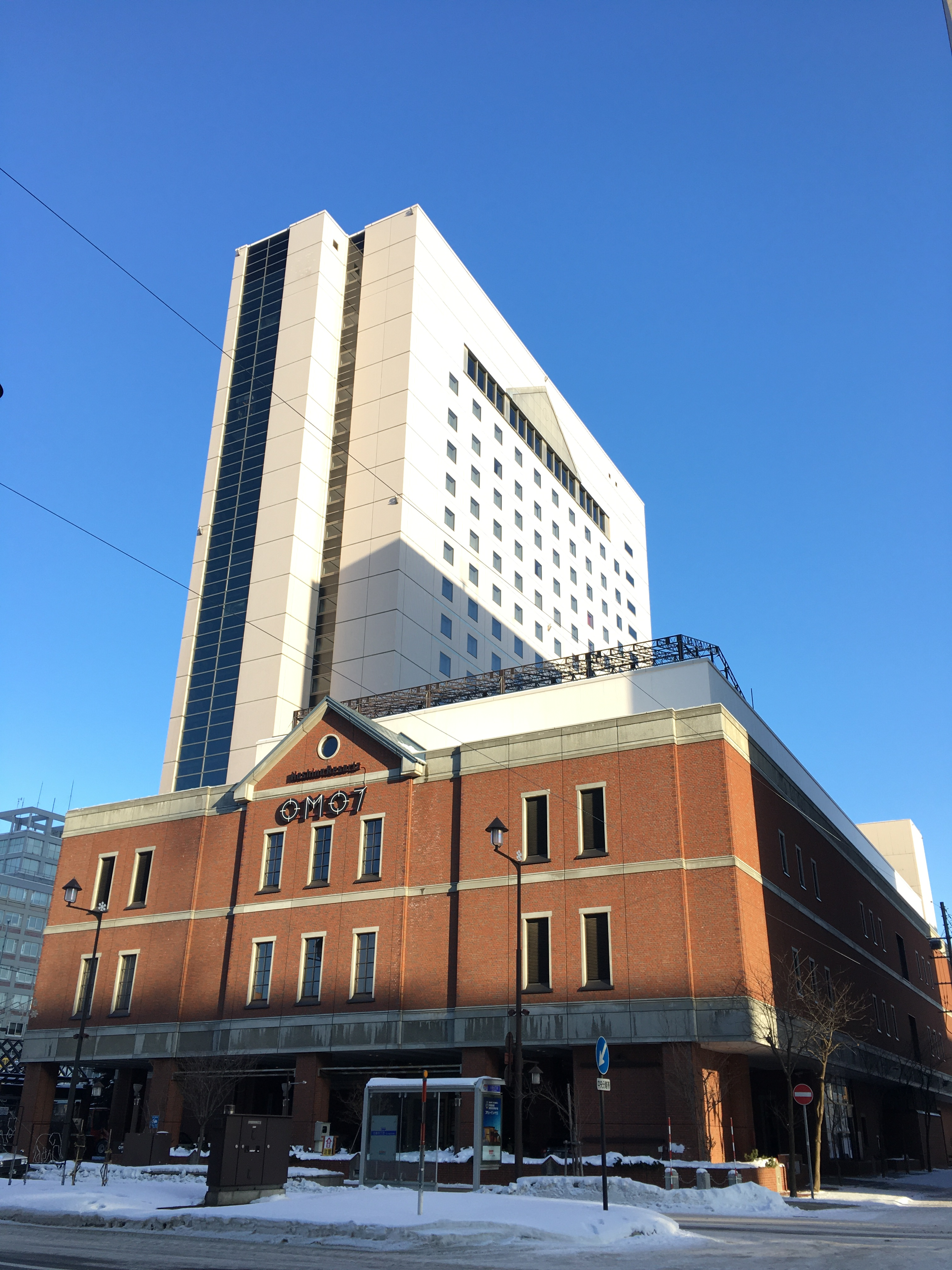 OMO7 旭川（旭川市）